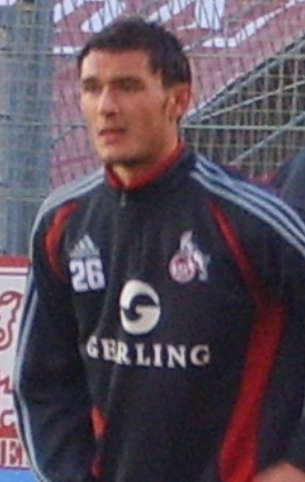 Aleksandar Mitreski, 1.FC Köln